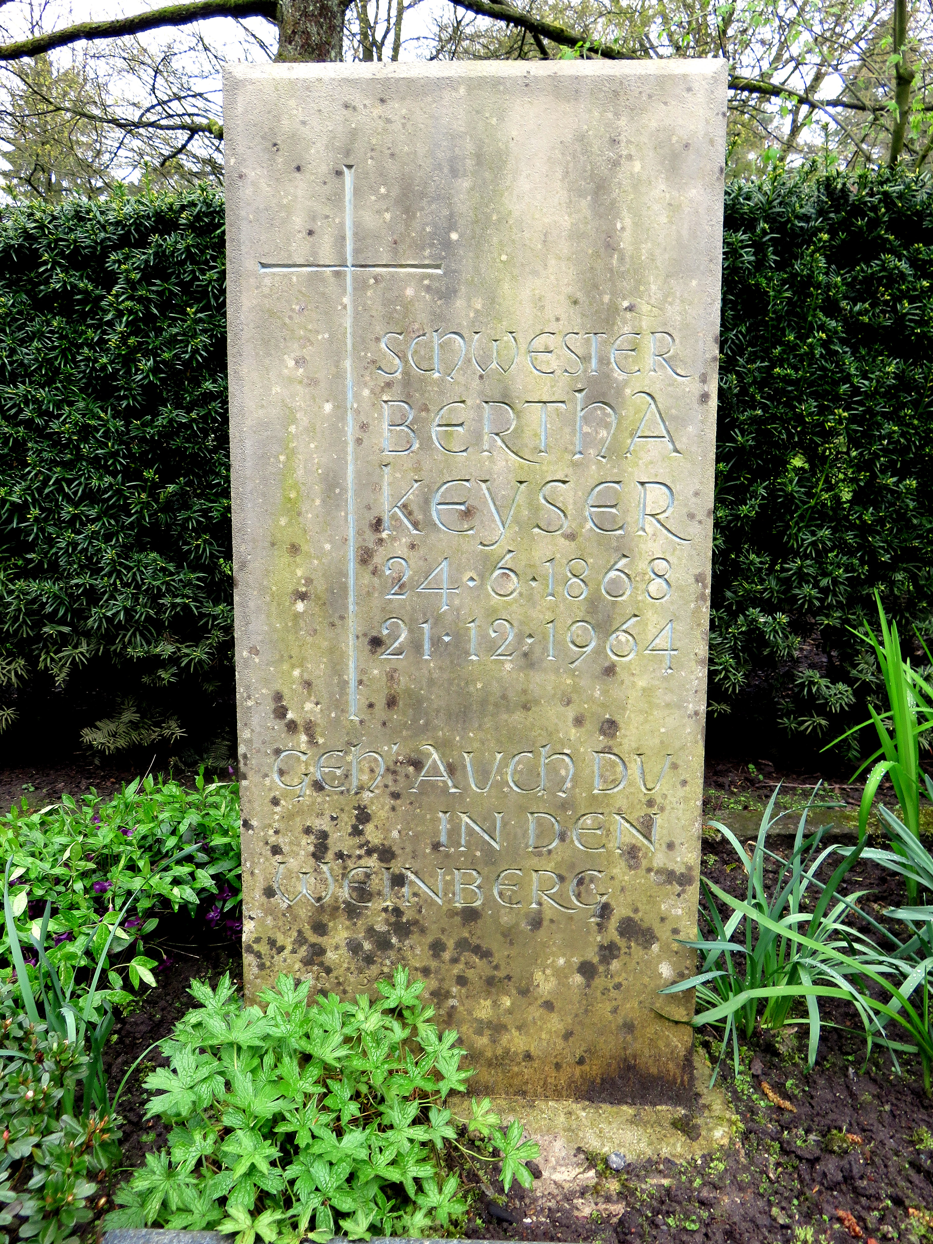 Historischer Grabstein der deutschen Ordensschwester Bertha Keyser im Bereich des Gartens der Frauen auf dem Ohlsdorfer Friedhof in Hamburg-Ohlsdorf. Ursprünglicher Standort: Planquadrat W 10 (Nebenallee, Höhe Kapelle 1) bei Hans-Günther Freitag: Von Mönckeberg bis Hagenbeck: ein Wegweiser zu denkwürdigen Grabstätten auf dem Ohlsdorfer Friedhof, Hansa-Verlag, Hamburg, 1973, Seite 60.